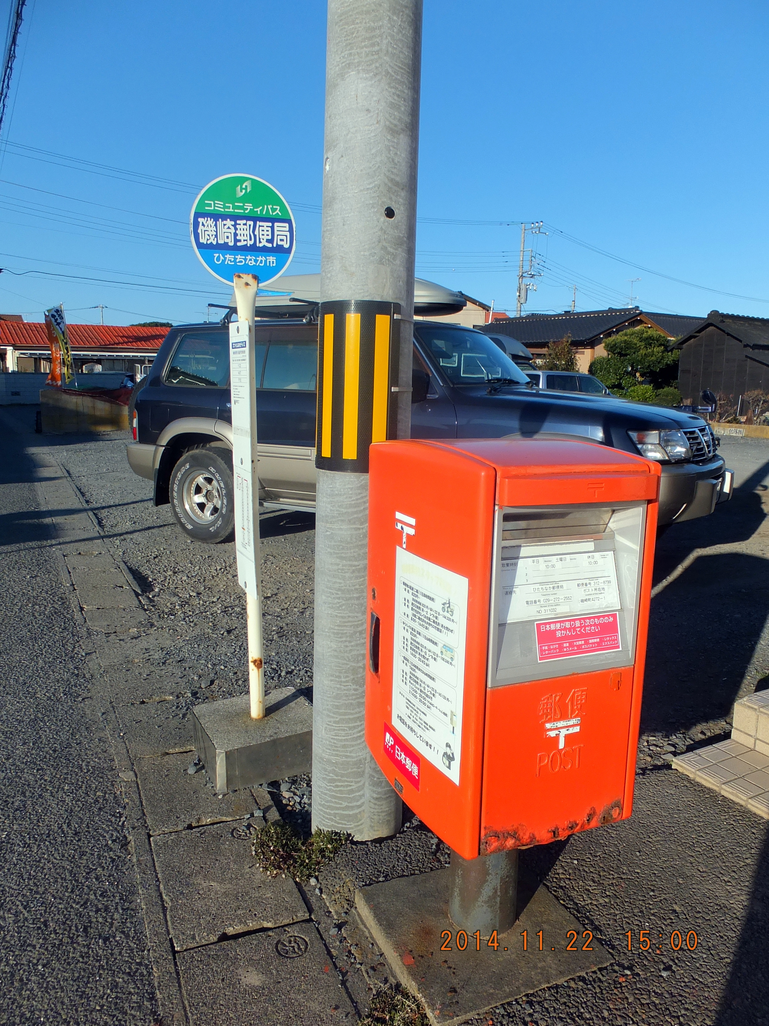 磯崎郵便局バス停